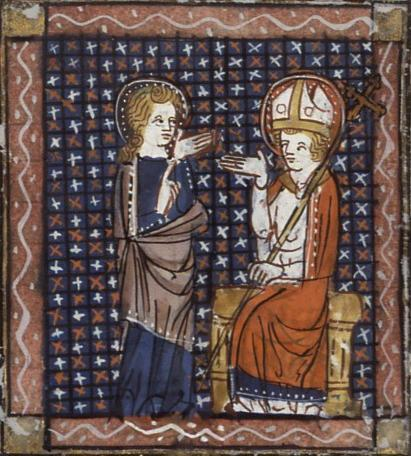 Saint Brice et saint Martin.